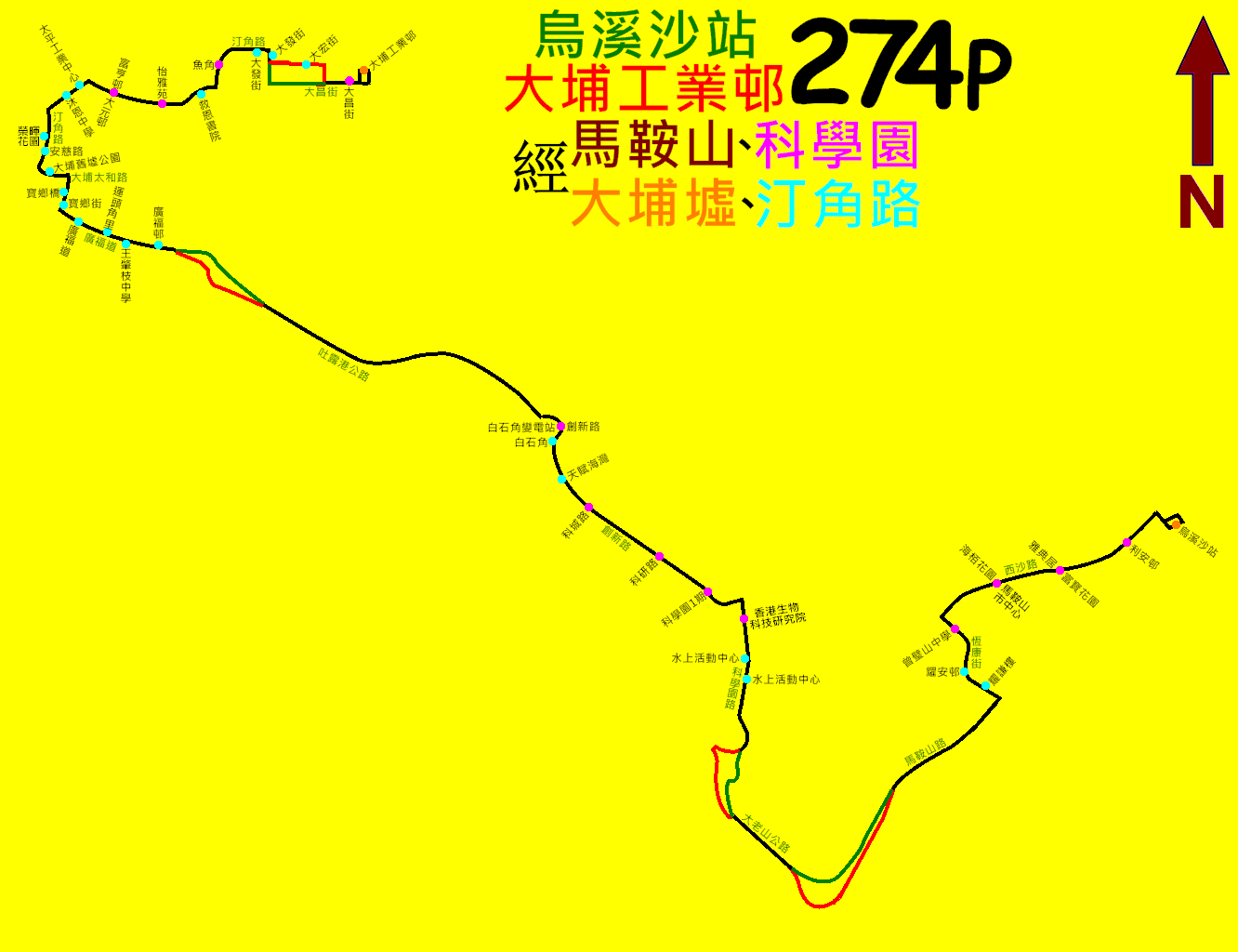 中文（香港）: 九巴274P線的走線圖